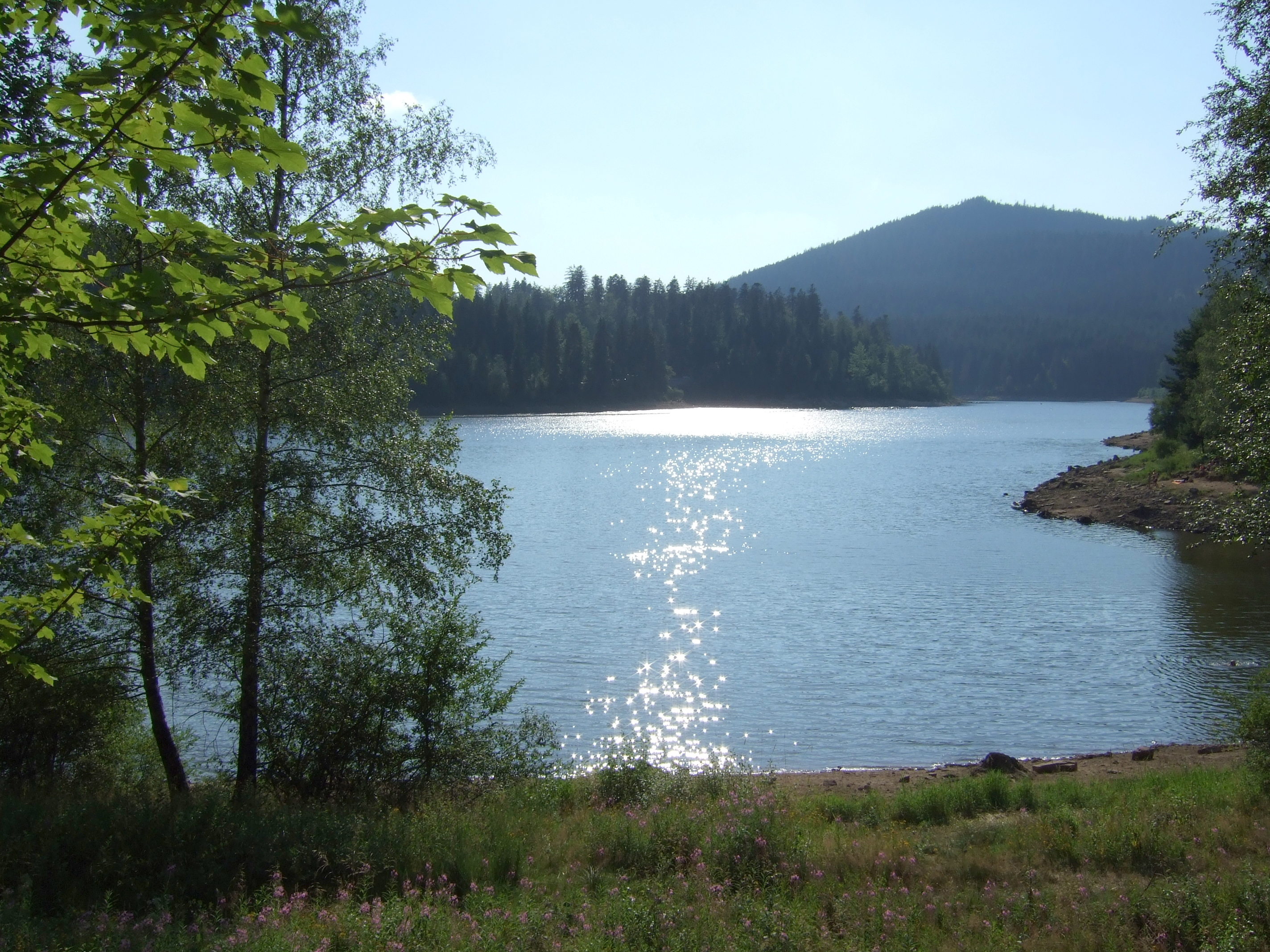 Schwarzenbachtalsperre in northern Black Forest, Germany